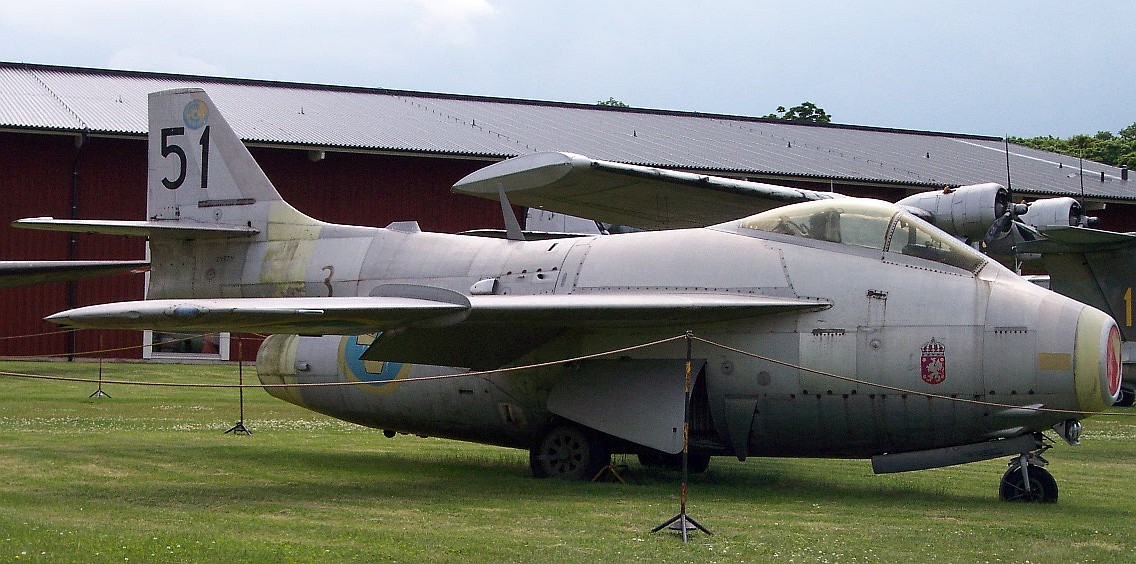 Saab J 29F Tunnan vid Flygvapenmuseum. Flygplansindividen är ursprungligen en Saab J 29B, och levererades den 18 augusti 1954 till F 3. Den 4 oktober 1954 överlämnades individen till FCS. Den 17 augusti 1955 överlämnades den till CVV för modifiering till J 29E. Den 1 oktober 1956 togs den in på Saab för modifiering till J 29F. Den 10 juni 1959 överfördes individen till F 16. Under 1964 märktes den om till 20-15. Den 13 juni 1968 överfördes individen till F 3, där den fick märkningen 3-51, och modifierades för målbogsering. Den 20 december 1974 kasserades individen i komplett skick, och överlämnades till Flygvapenmuseum.